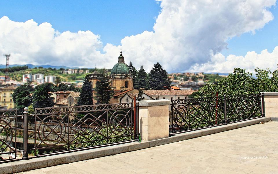 Panorama parziale del centro storico di Cosenza con vista sulla Cupola della Chiesa di San Domenico